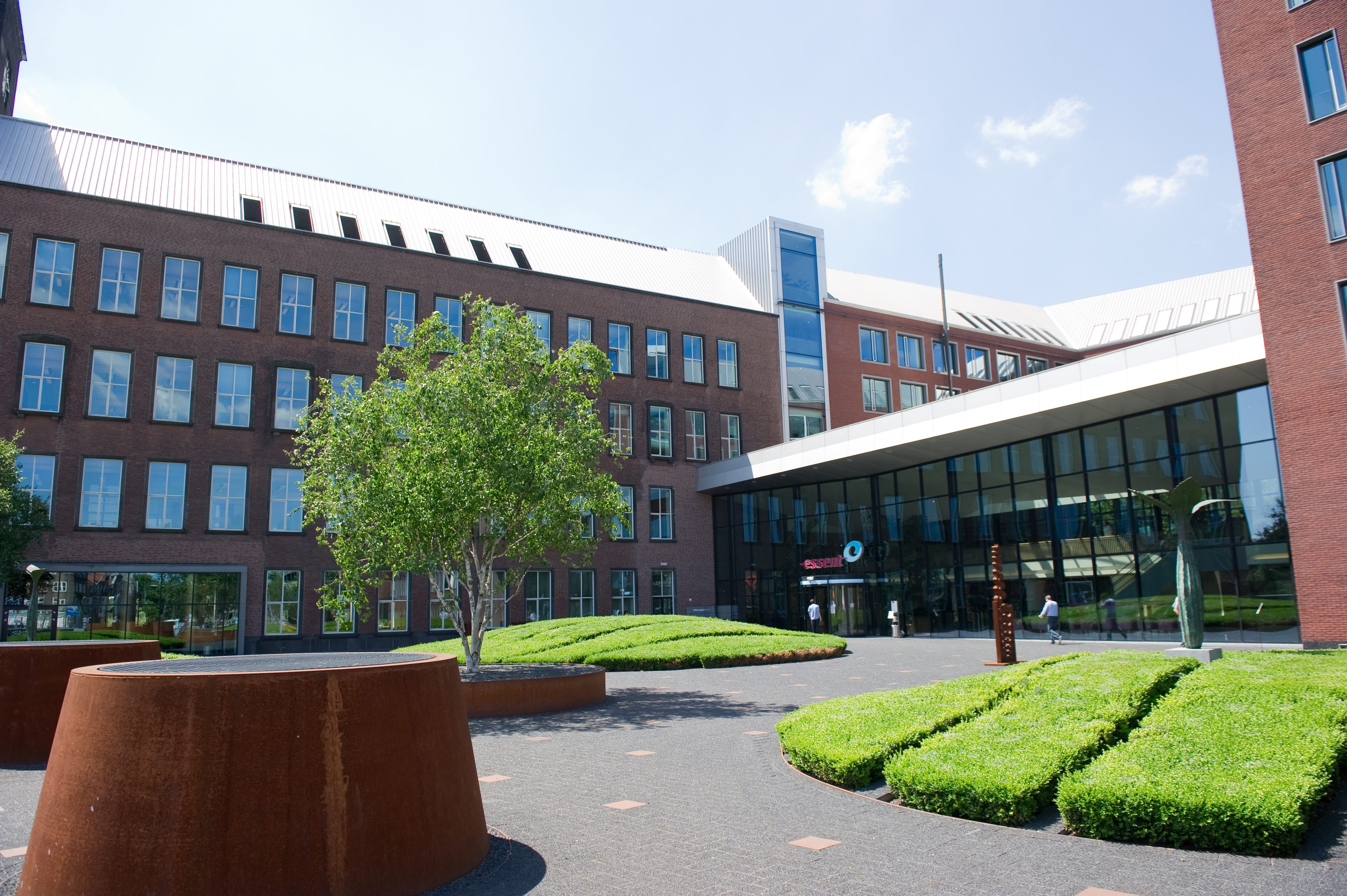 Het hoofdkantoor van Essent in Den Bosch; dit gebouw is sinds januari 2011 het hoofdkantoor van Essent, hoewel ook daarvoor Essent hier al gevestigd was (tot 2011 zat het hoofdkantoor in Arnhem). Foto: Essent; Castel Communicatie